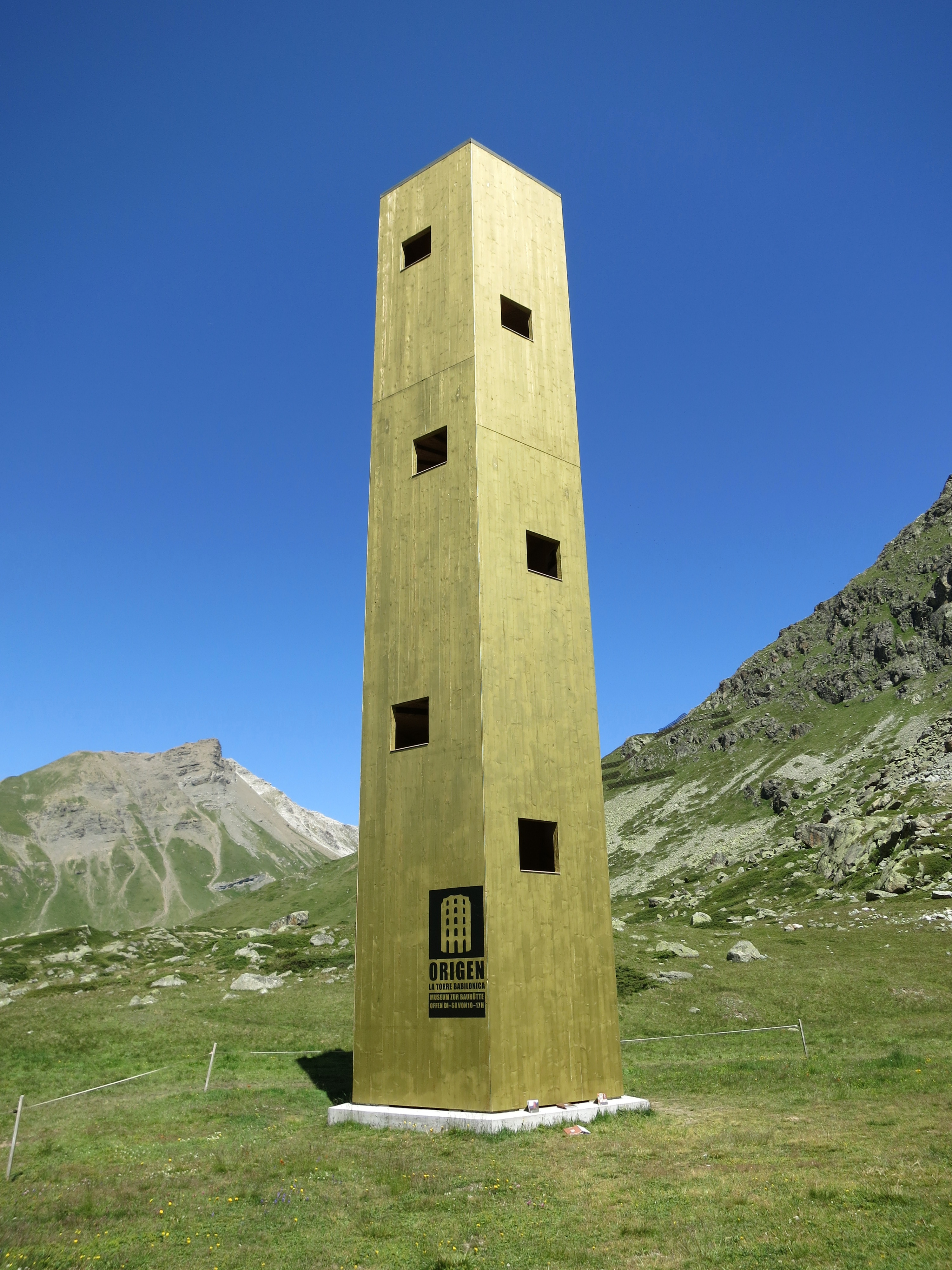 Las_Colonnas